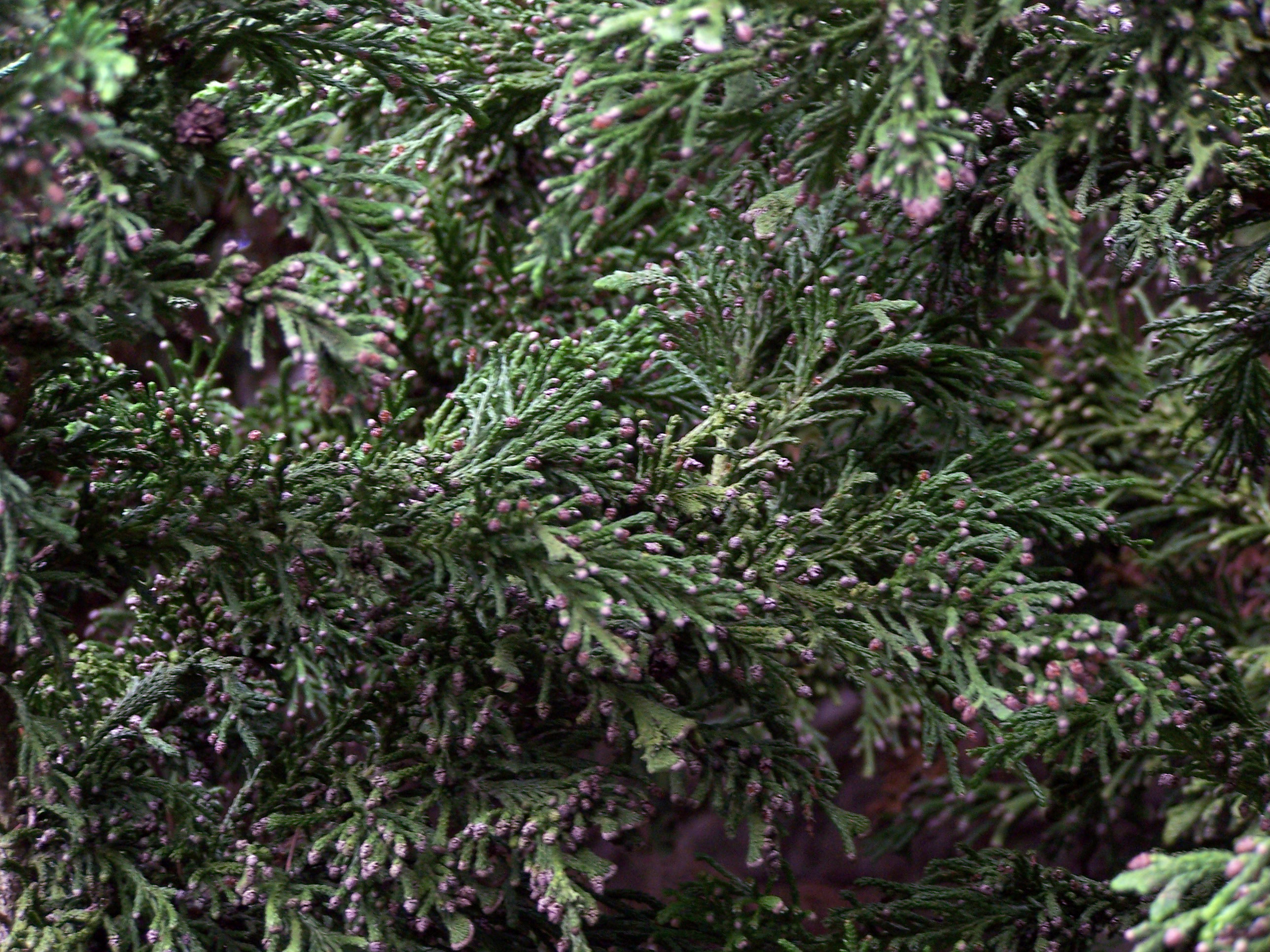 Chamaecyparis thyoides 17 juin 2006 Vieux jardin botanique de Göttingen